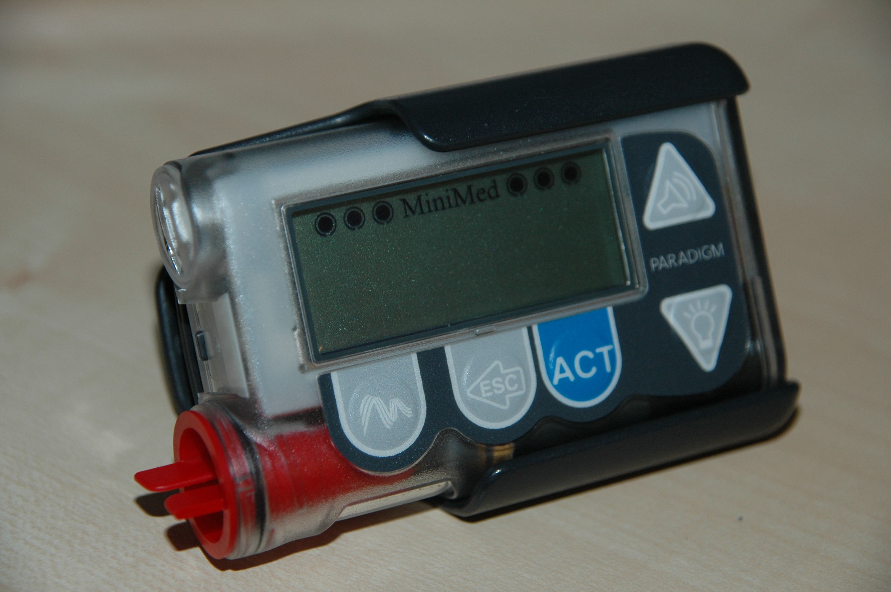 Medtronic Minimed Paradigm 511 Infusionspumpe